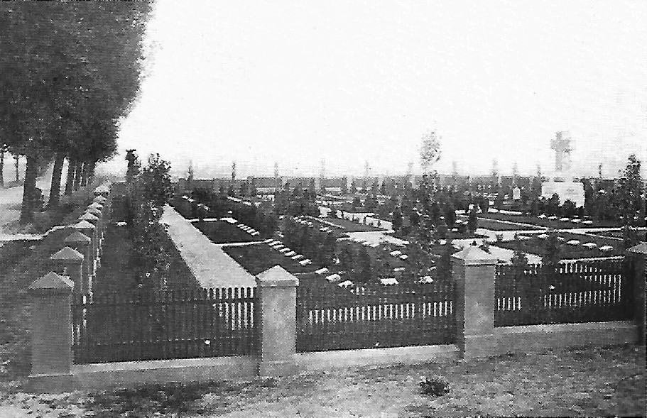 Regimentsfriedhof bei Le Willy (an der Chaussee Lille-La Bassée)